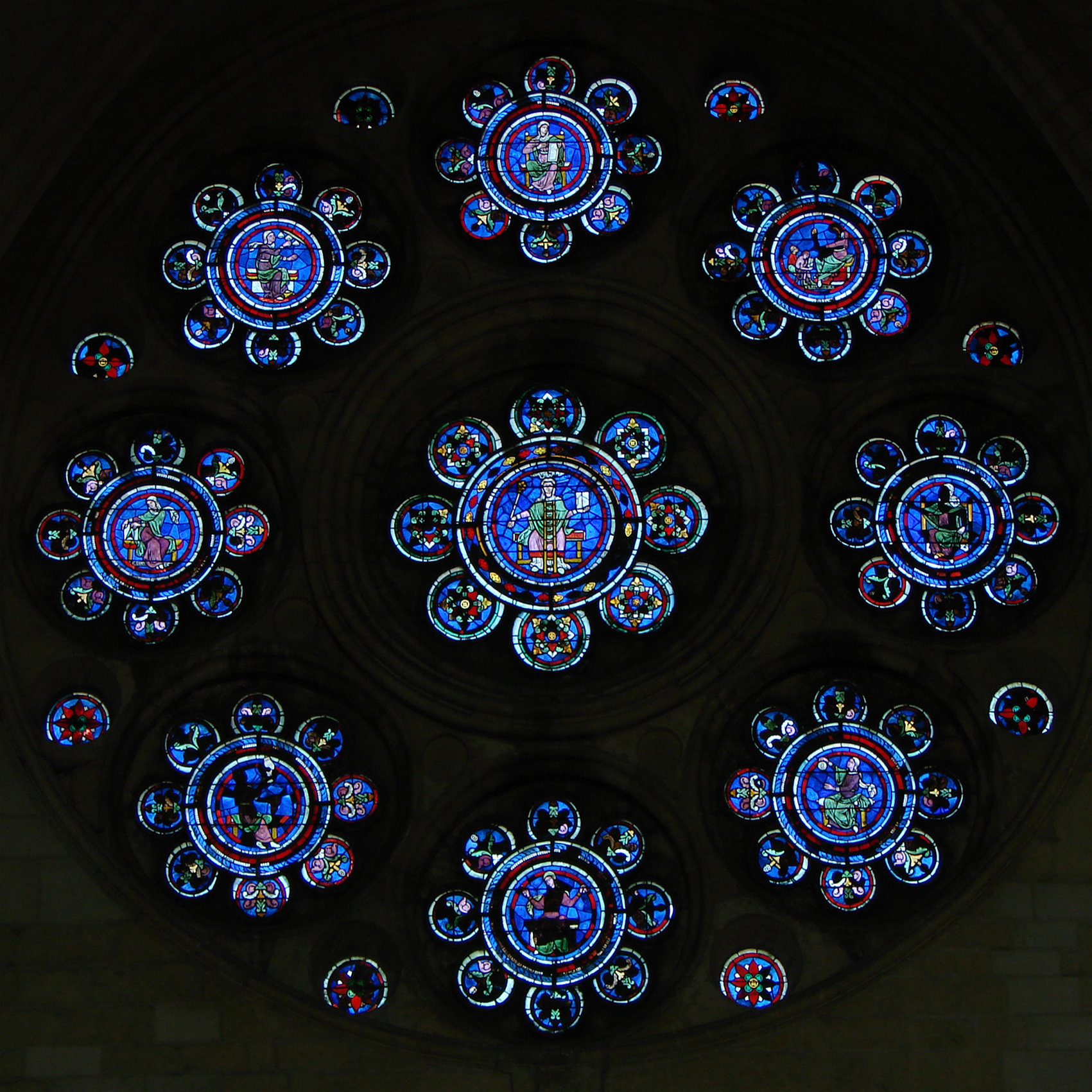 Rose du transept Nord de la cathédrale Notre-Dame de Laon: la Rose des Arts libéraux. Les médaillons représentent les 7 arts libéraux, auxquels ont été ajoutées la Médecine et la Philosophie (médaillon central). Le vitrail date de 1200 à 1210, mais quatre médaillons ont été réalisés par Adolphe Charles Edouard Steinheil en 1865 (la Philosophie,, la Rhétorique, la Musique, la Médecine); il a repris les figures des voussures d'un portail de la façade, consacrées elles aussi aux Arts libéraux. (Source: le site du Ministère de la Culture)